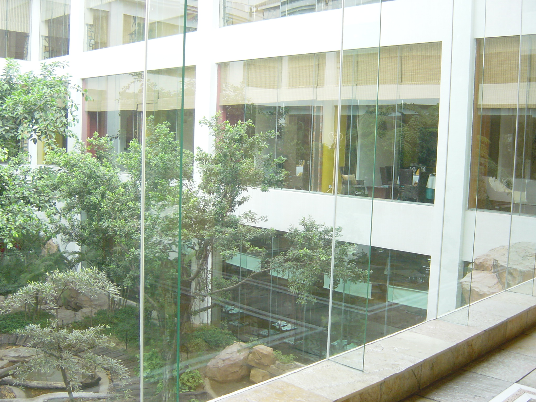 长隆酒店内白虎餐厅一角，本图片由上载者老火豆沙煲于2004年11月9日拍摄。